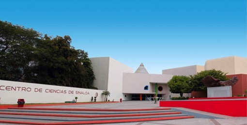 Fachada del centro de ciencias de sinaloa